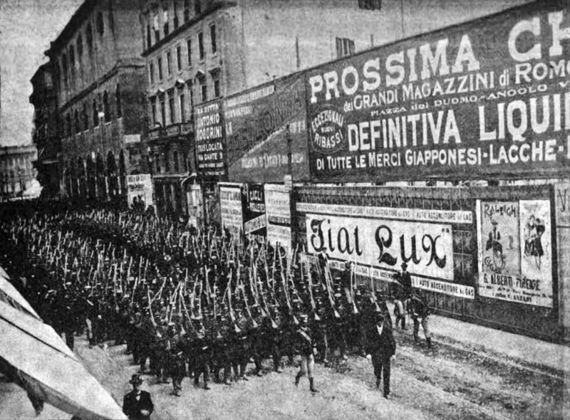 Trasferimento in carcere degli arrestati per i moti del 1898